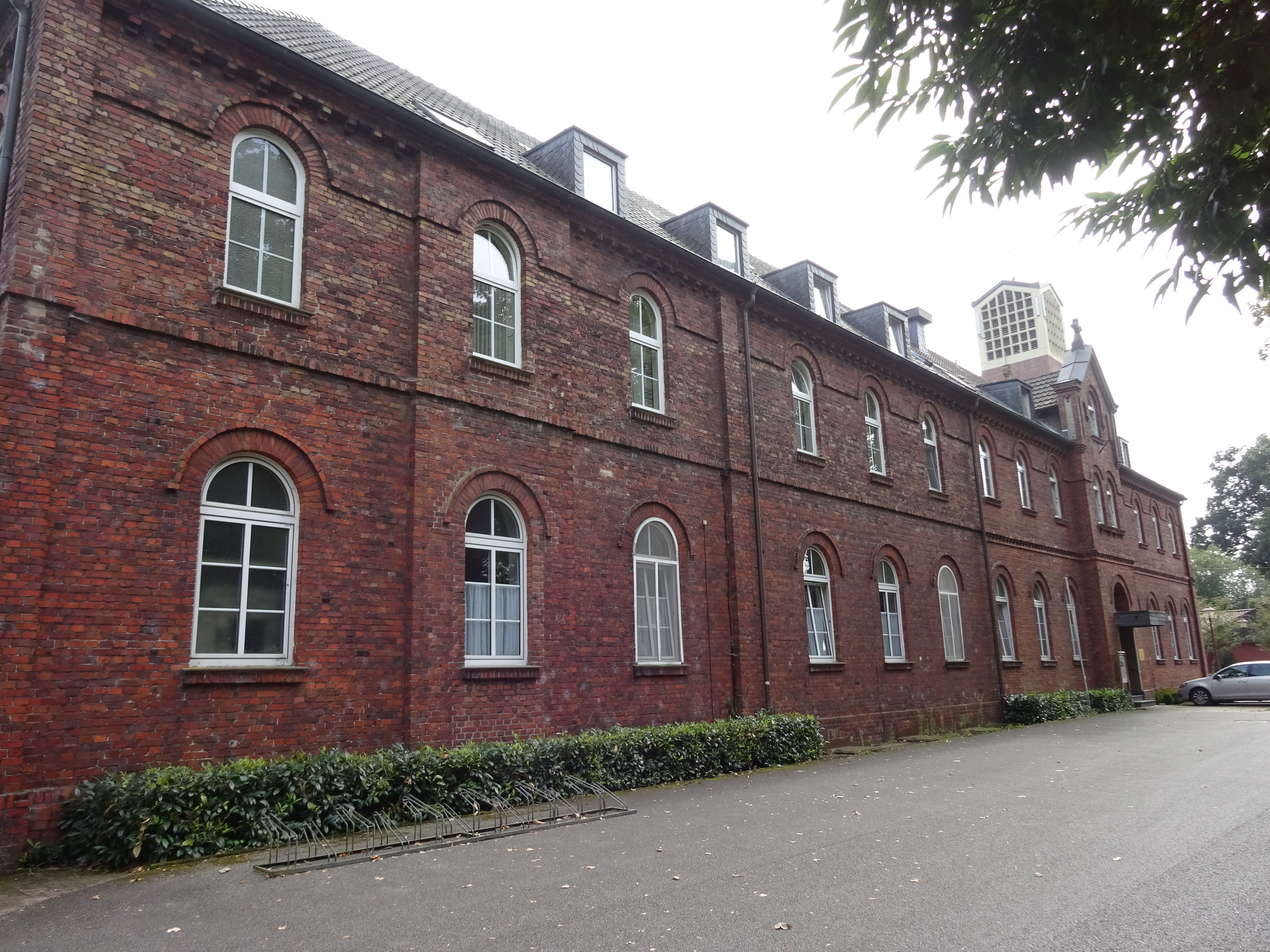 Am Kloster 9, Maria Veen, Klosterflügel